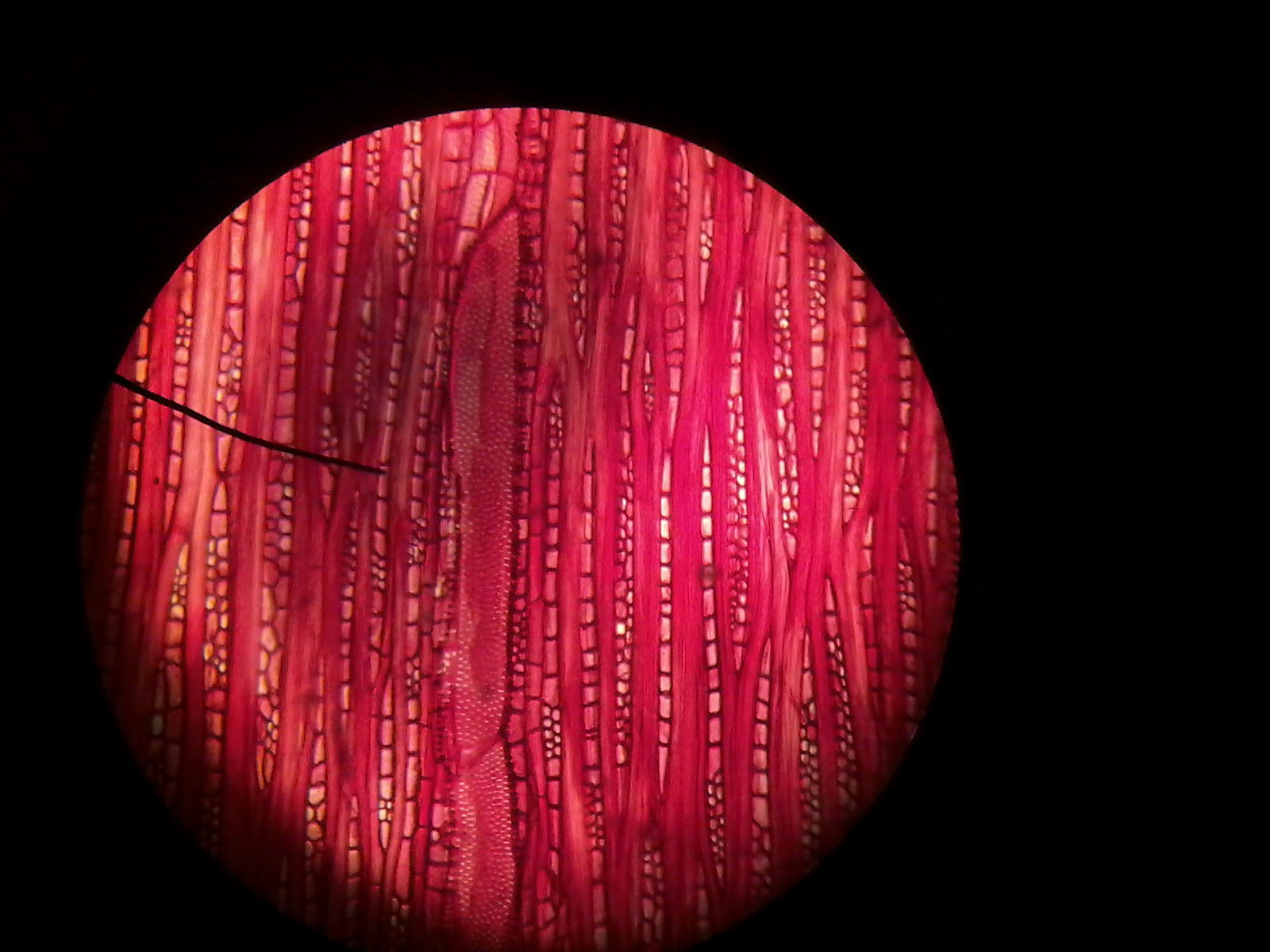 Xilema em corte longitudinal tangencial, mostrando-se os elementos de vaso com pontoações areoladas, células dos parênquimas axial e radial e fibras libriformes